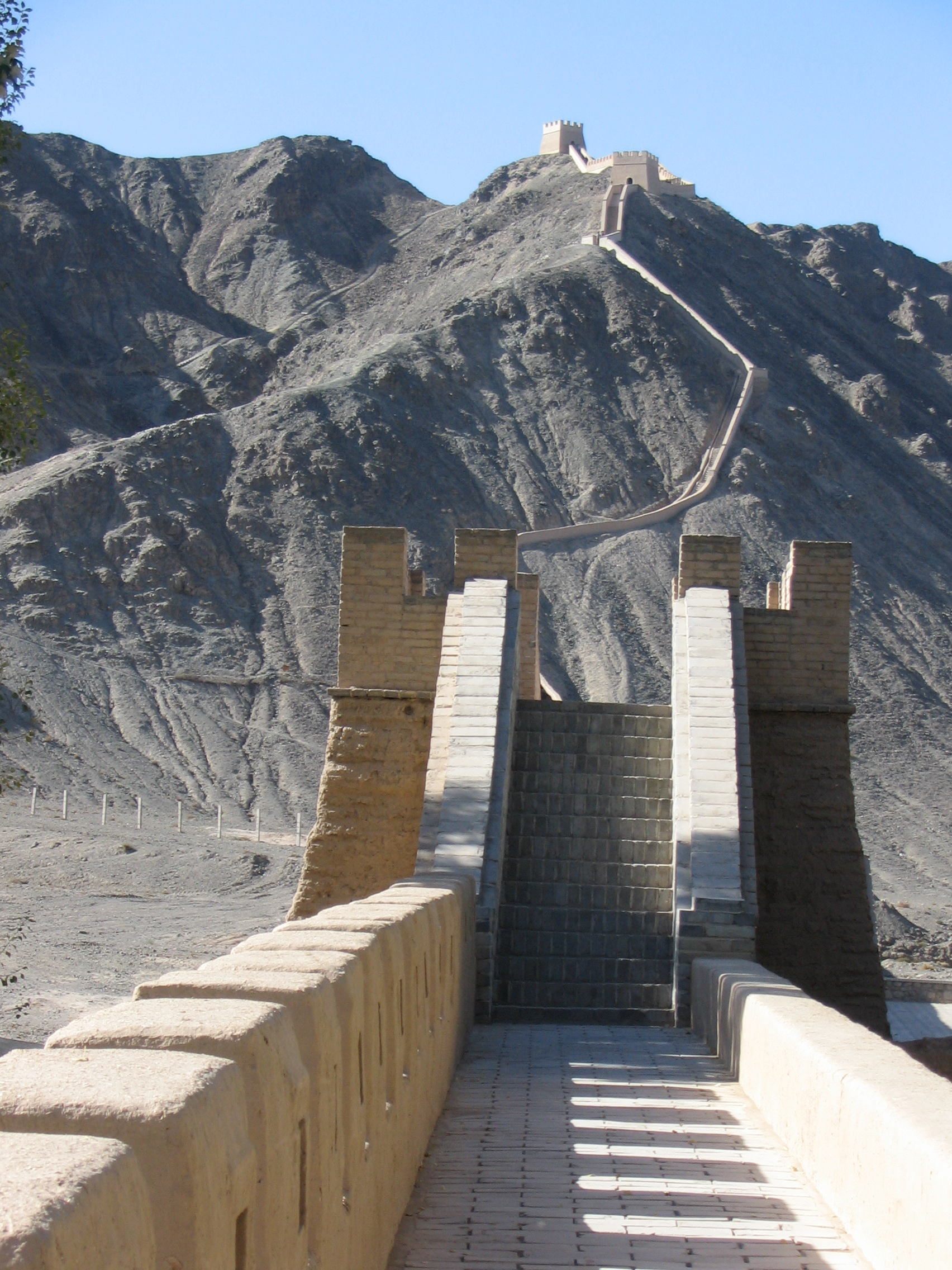 Loris Romito - Viaggio Cina novembre 2005